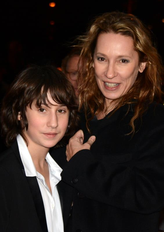 Nemo Schiffman et Emmanuelle Bercot à la cérémonie des César